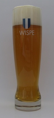 Wispe bierglas 0,3 ltr